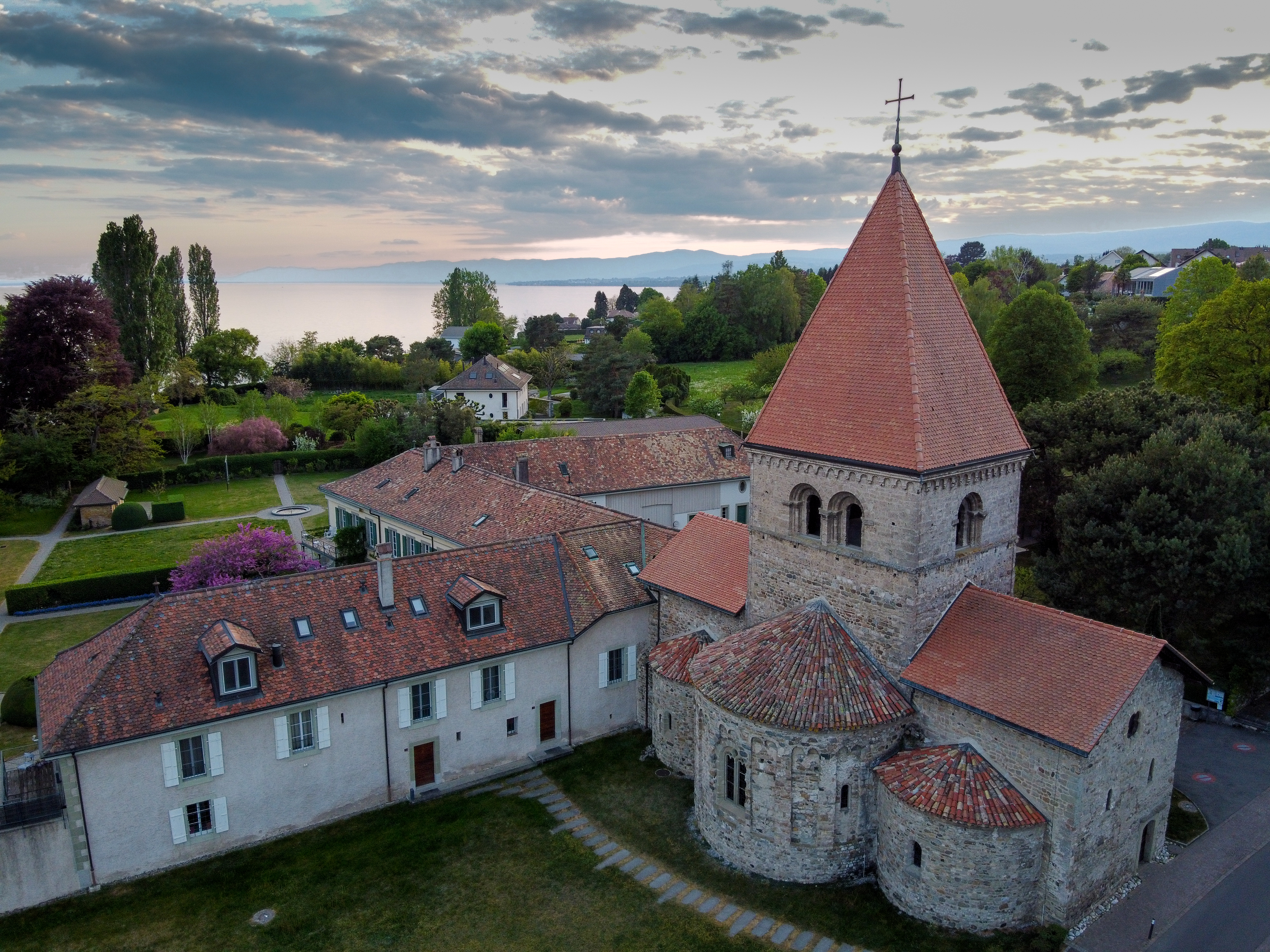 Vue aérienne de l'église St-Sulpice